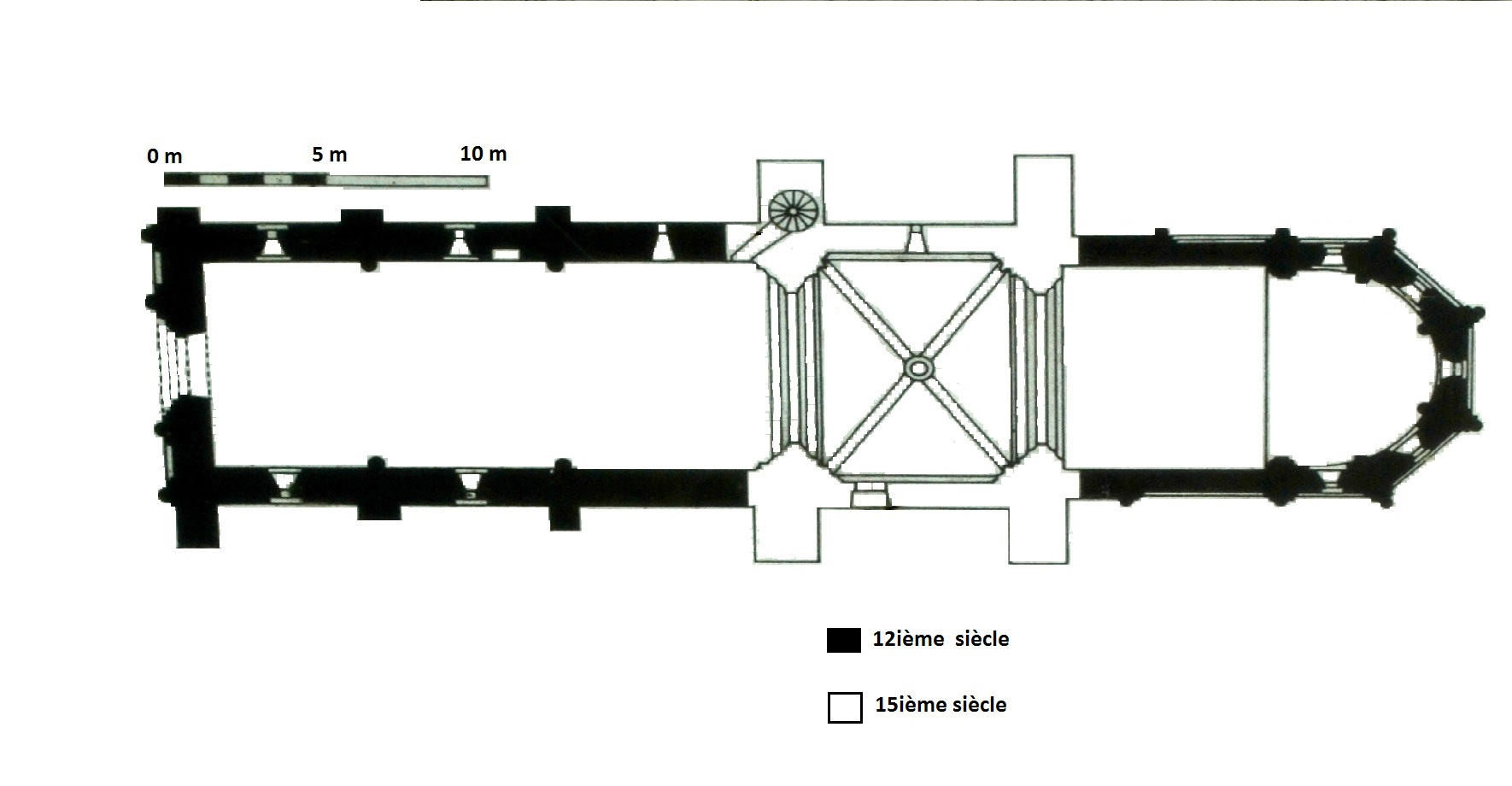 Rétaud église Plan